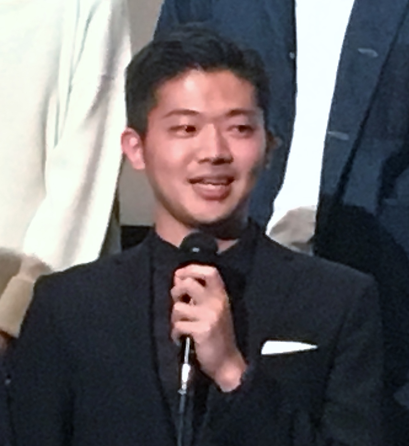 長部努（2018年11月15日、新宿K's cinema） 「あいが、そいで、こい」舞台挨拶にて